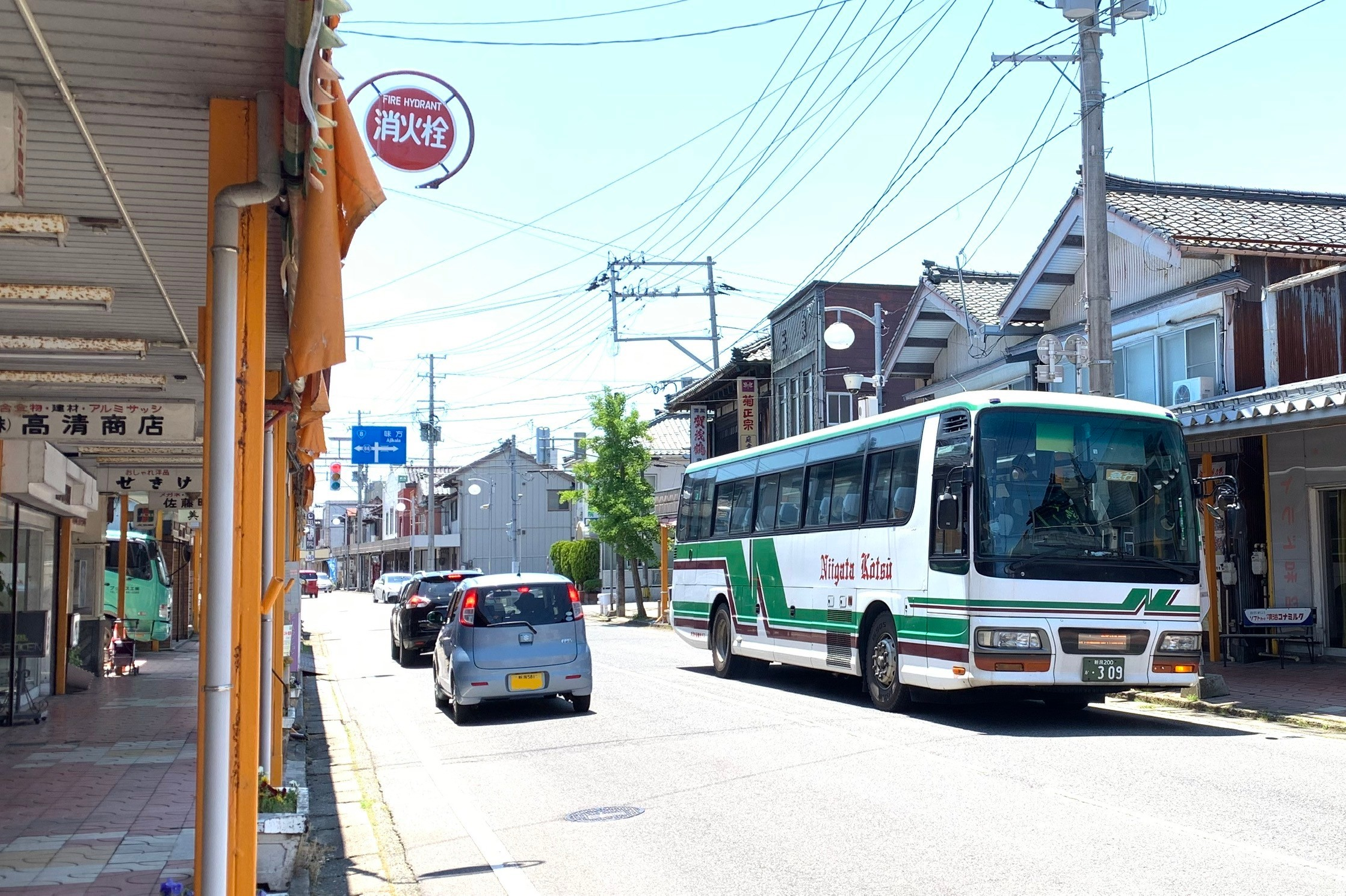 白根市街（新潟市南区）と新潟都心方面を結ぶ急行路線バス車両（2020年5月）「五の町」バス停にて（新潟交通観光バス W7 大野・白根線）